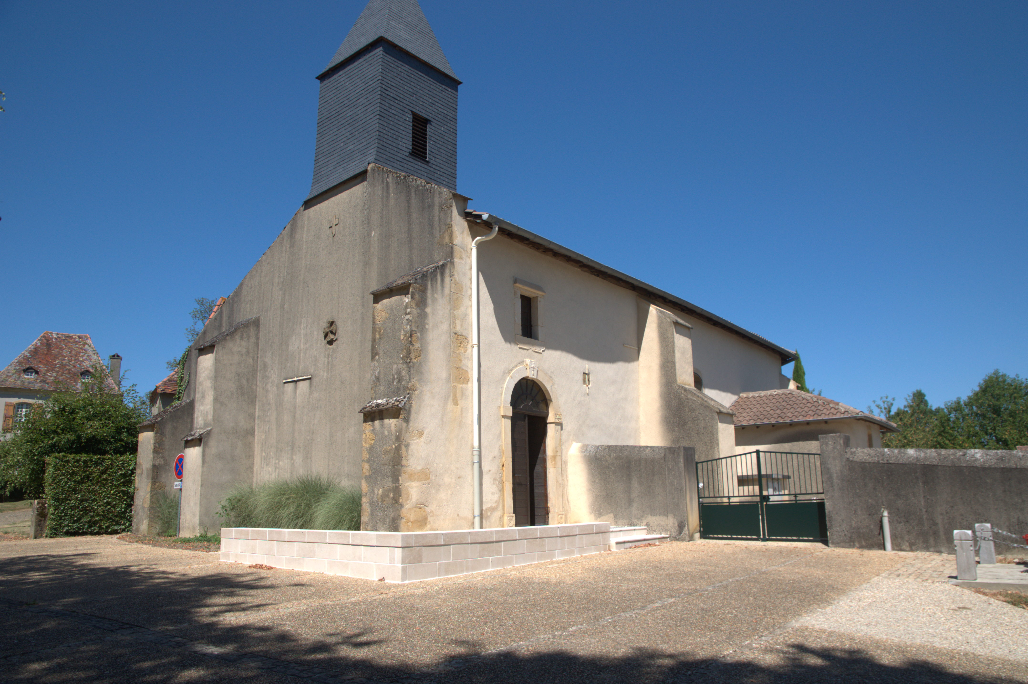 Eglise de Mascaraàs - Béarn - France.